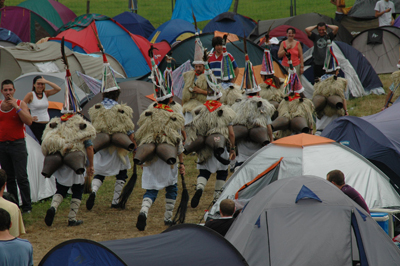 joaldunak akanpalekuan